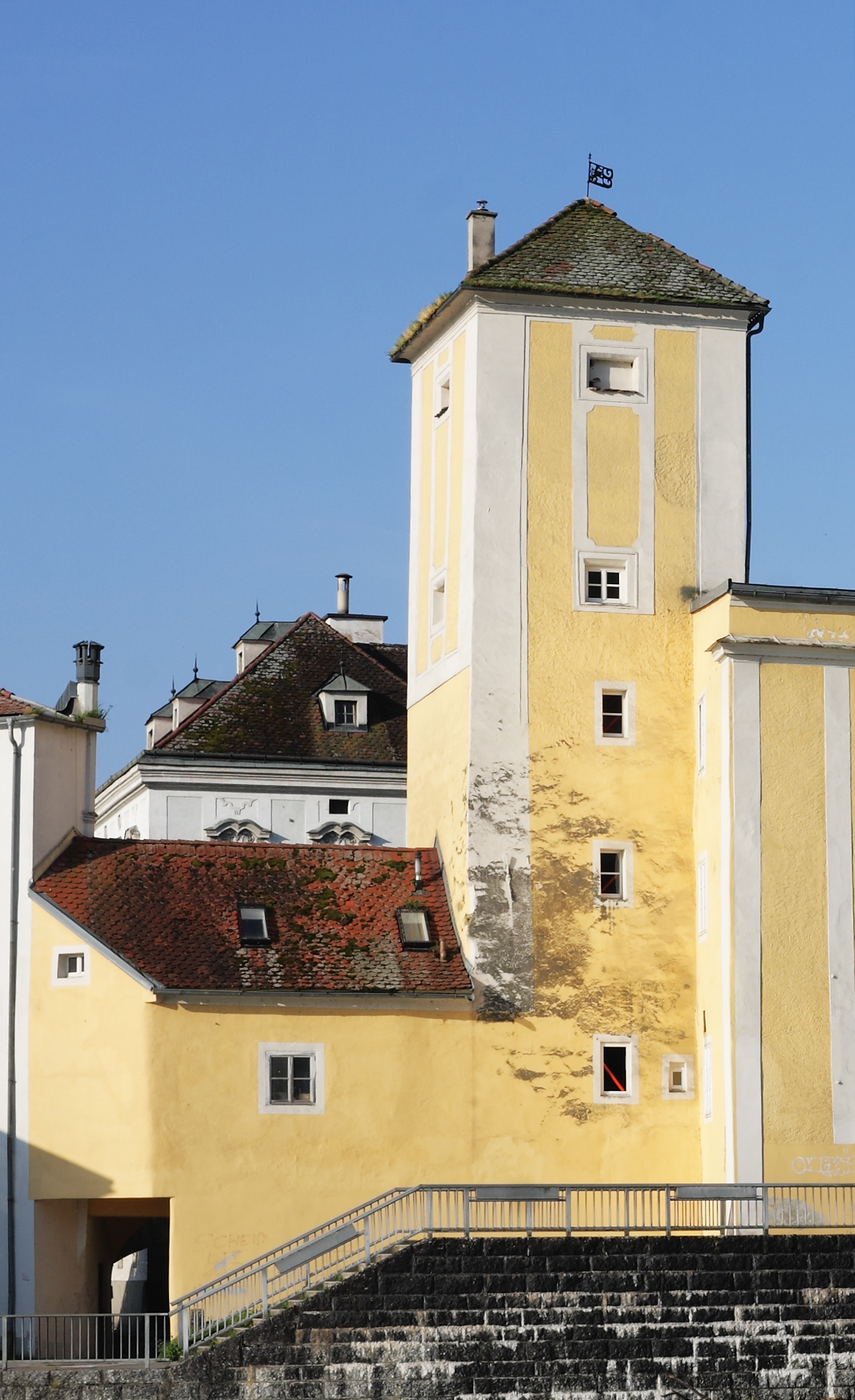 Nordfassade des Steyrer Wasserturms, Zwischenbrücken 3. Blick vom Ortskai